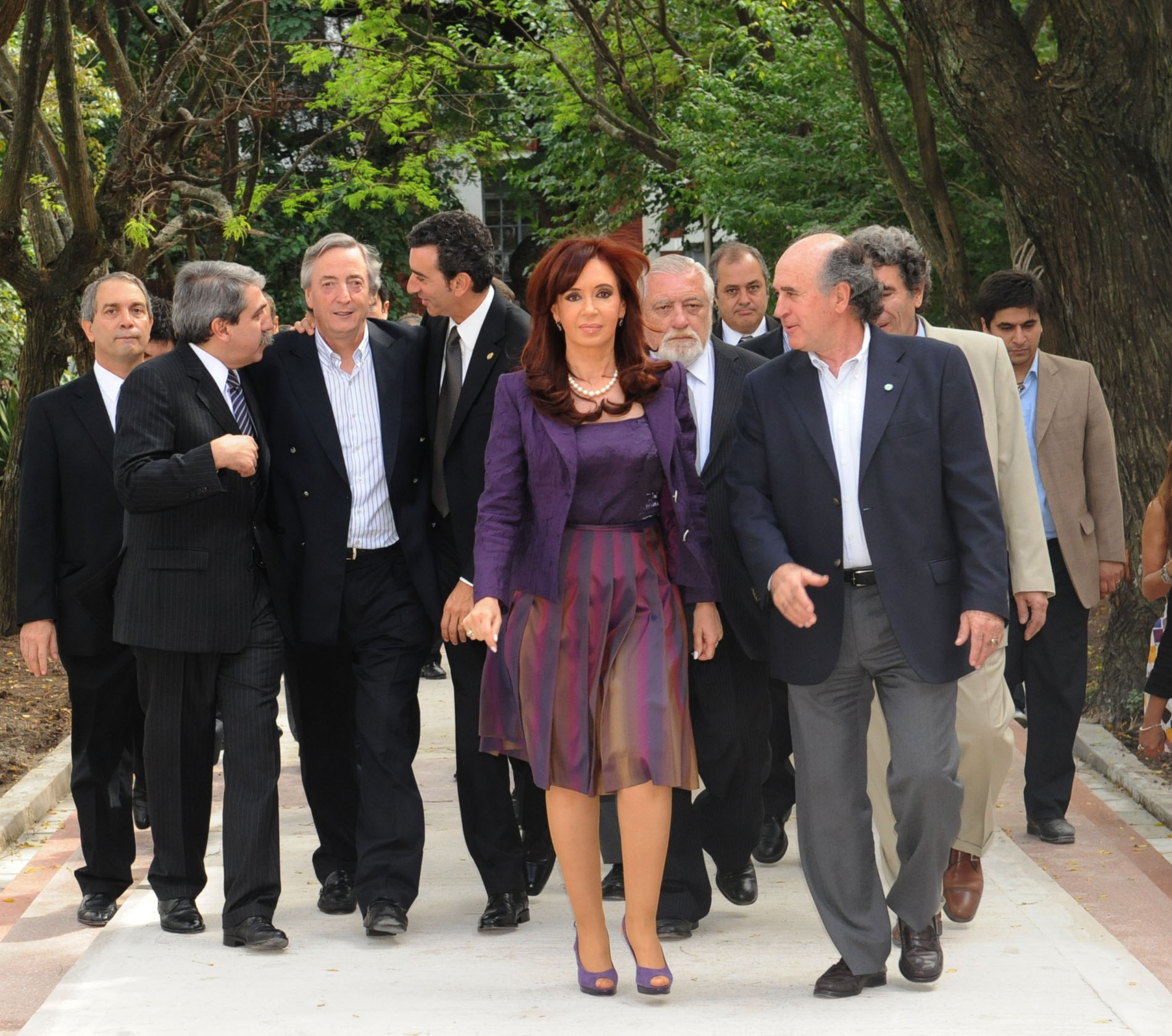 Cristina Fernández de Kirchner, acto en la ESMA por el día de la memoria